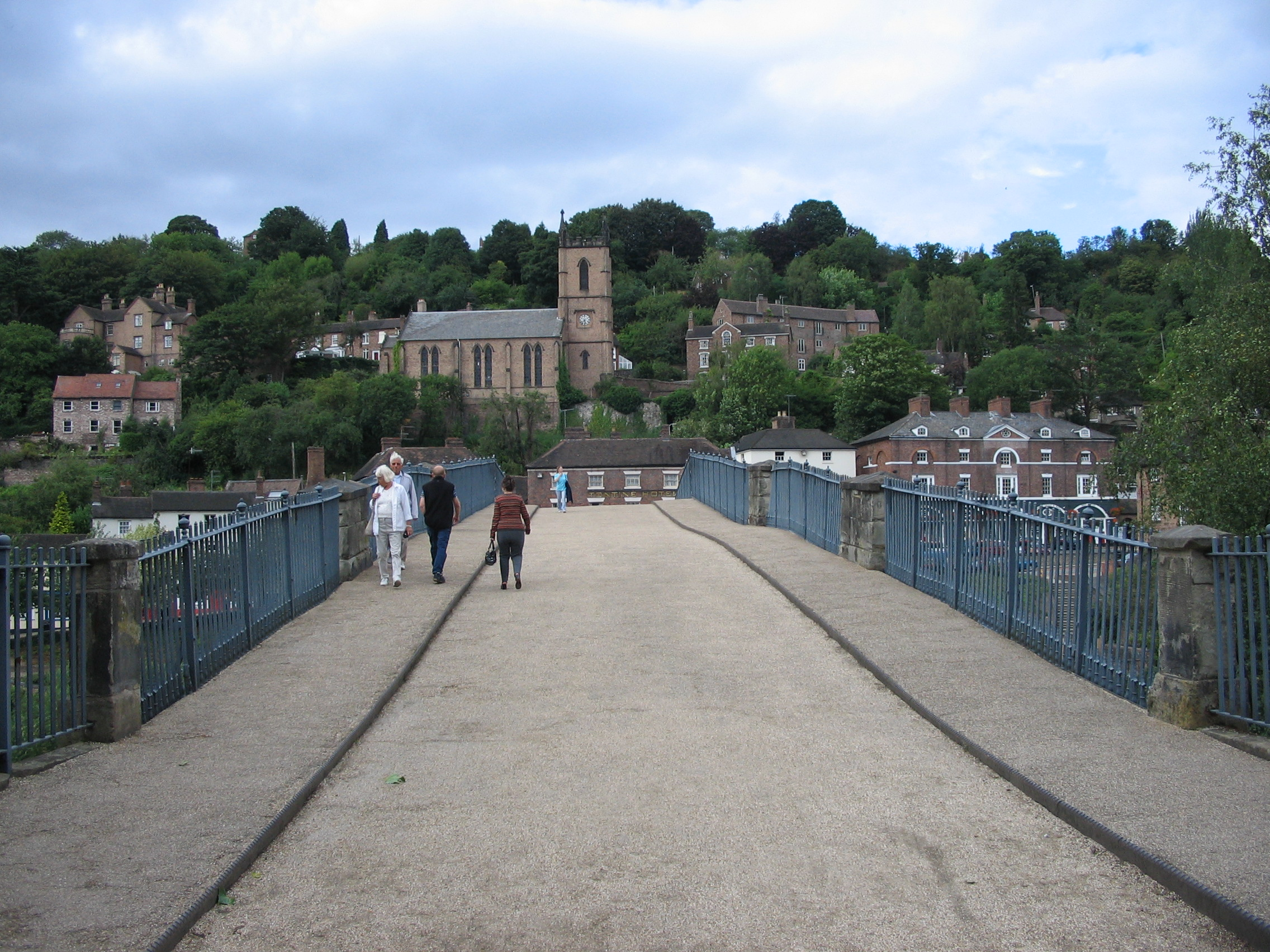 Iron Bridge - augustus 2006 - eigen foto